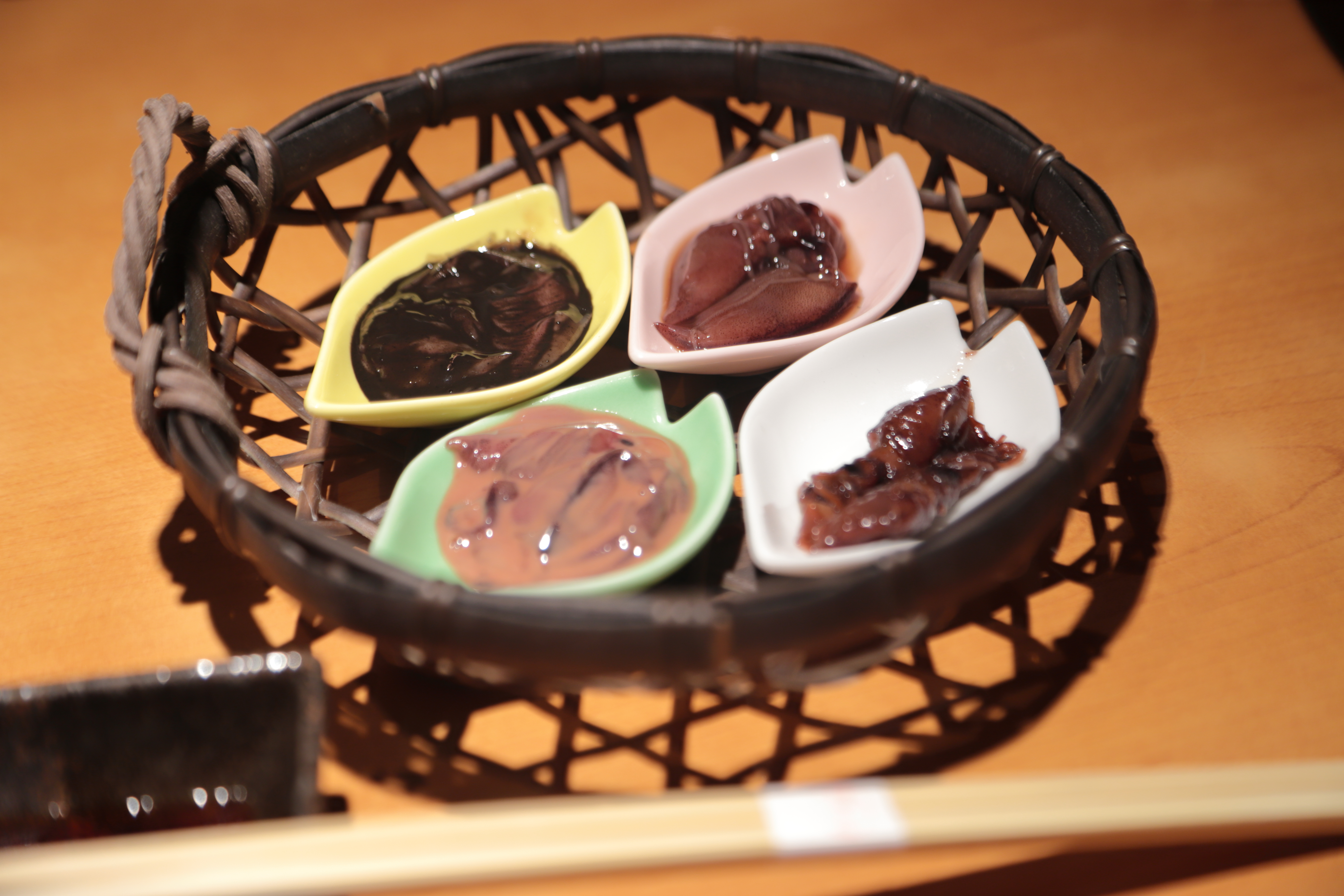 ホタルイカの調理例。右上から時計回りで醤油漬け・干物・塩辛・黒作り（塩辛のイカ墨）の4種類。暖座Classic 富山駅前店にて撮影。